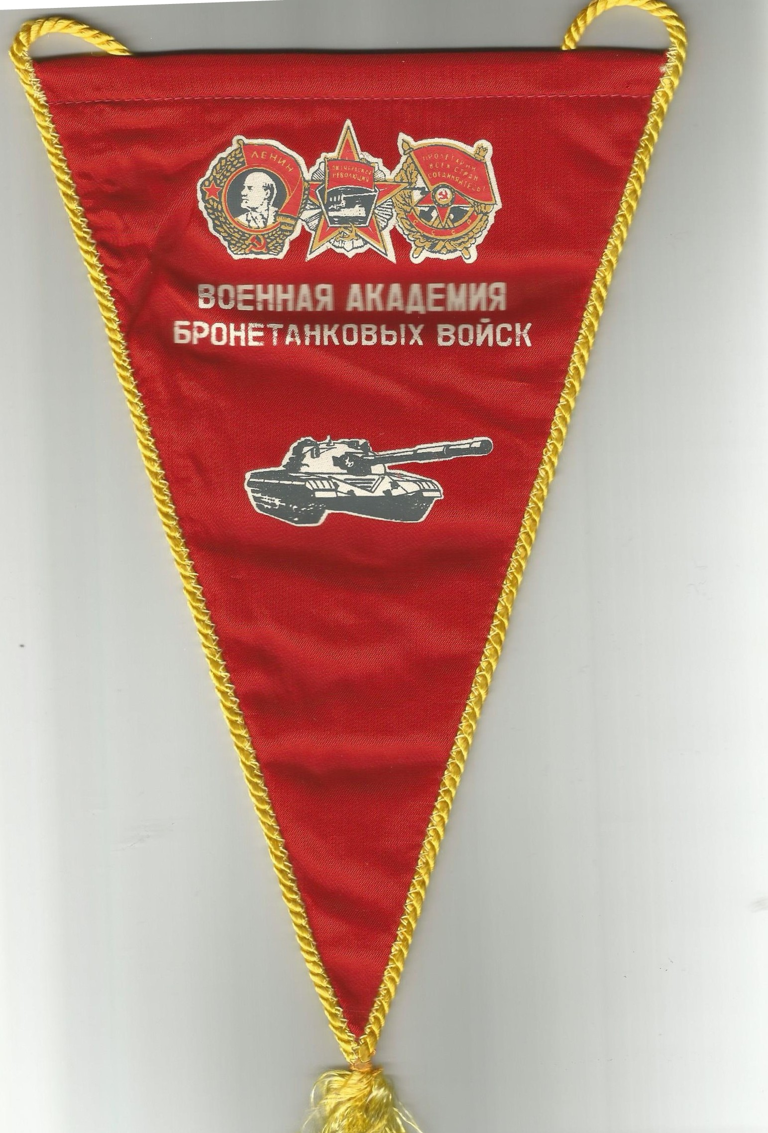 Proporczyk WABW